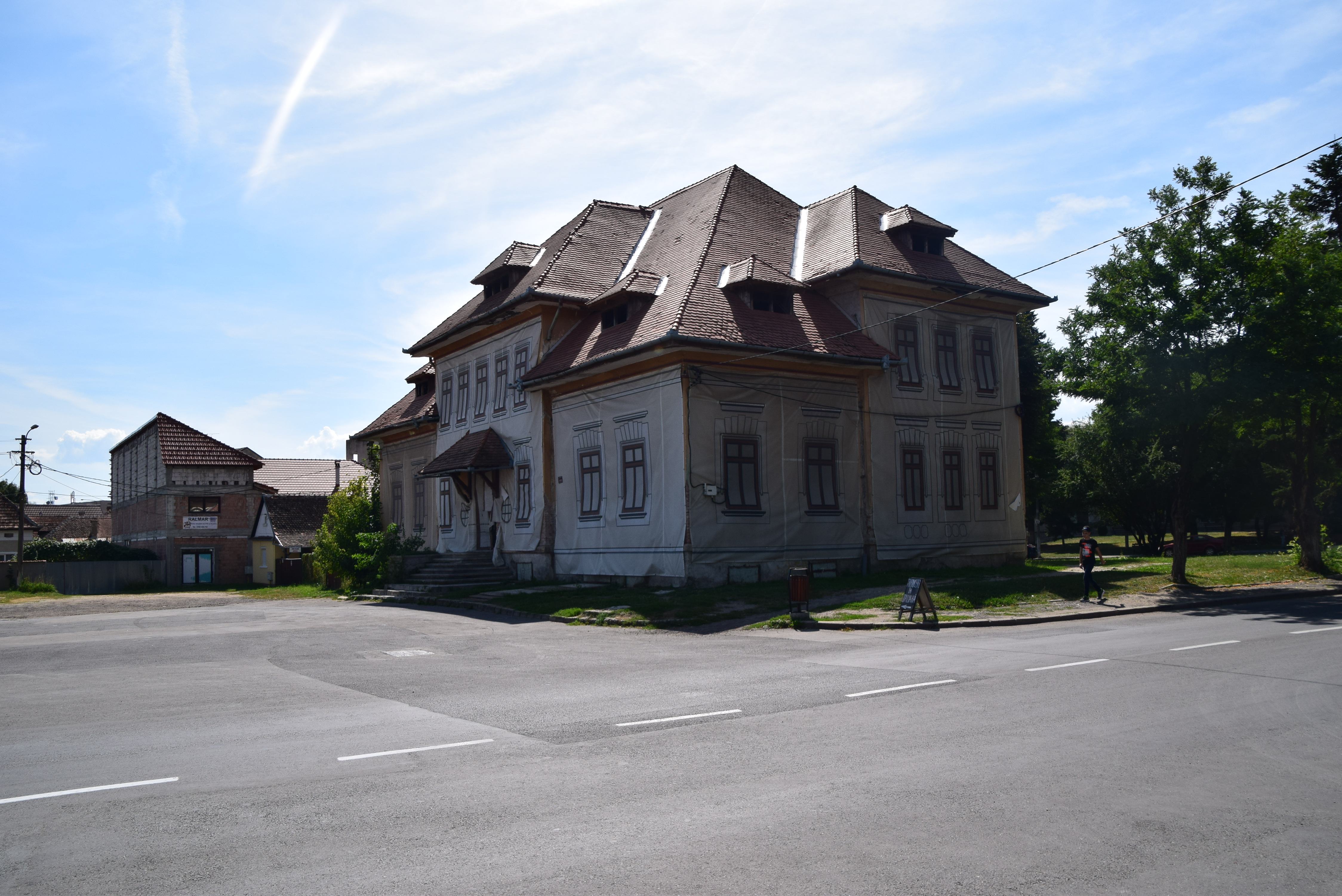 Baia comunală Făgăraș (1885)